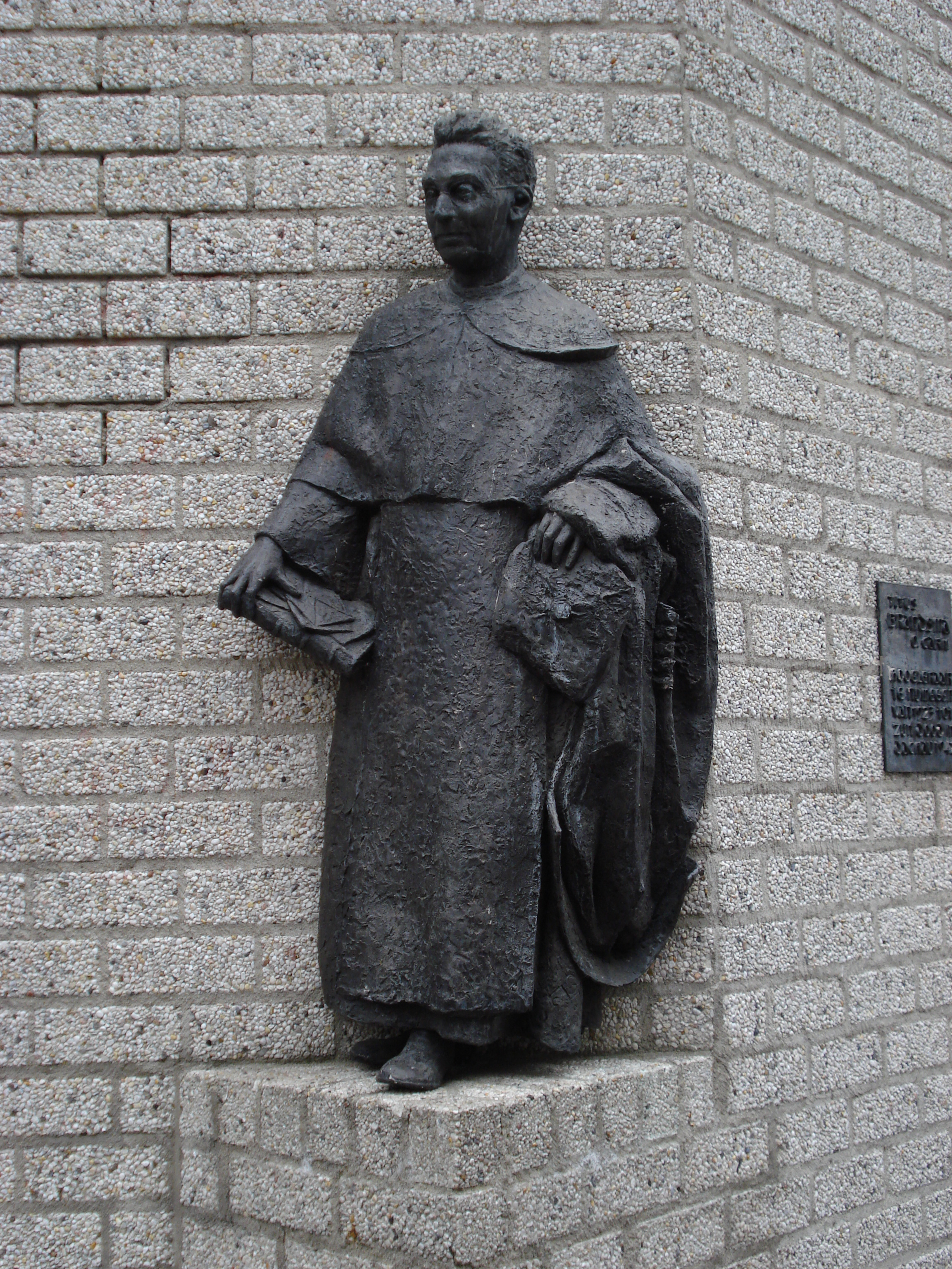 Nimègue, statue de Titus Brandsma au campus universitaire